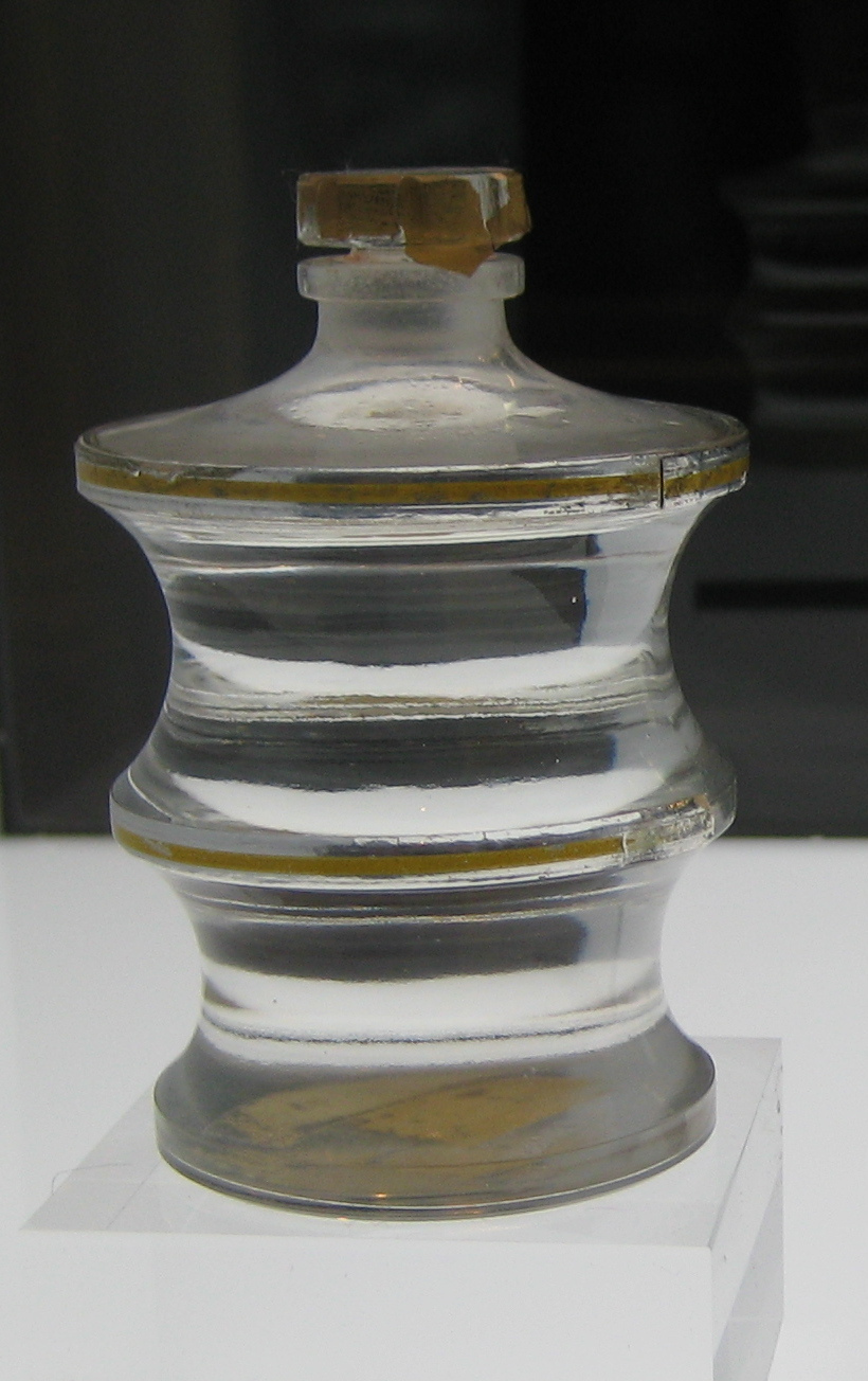 Guerlain - Sous Le Vent, 1934